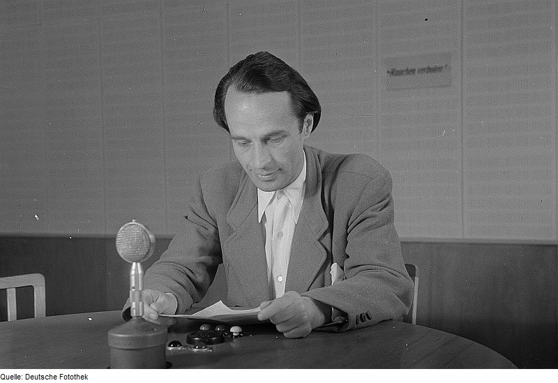 Original image description from the Deutsche FotothekPortrait Heinz Ruschs?